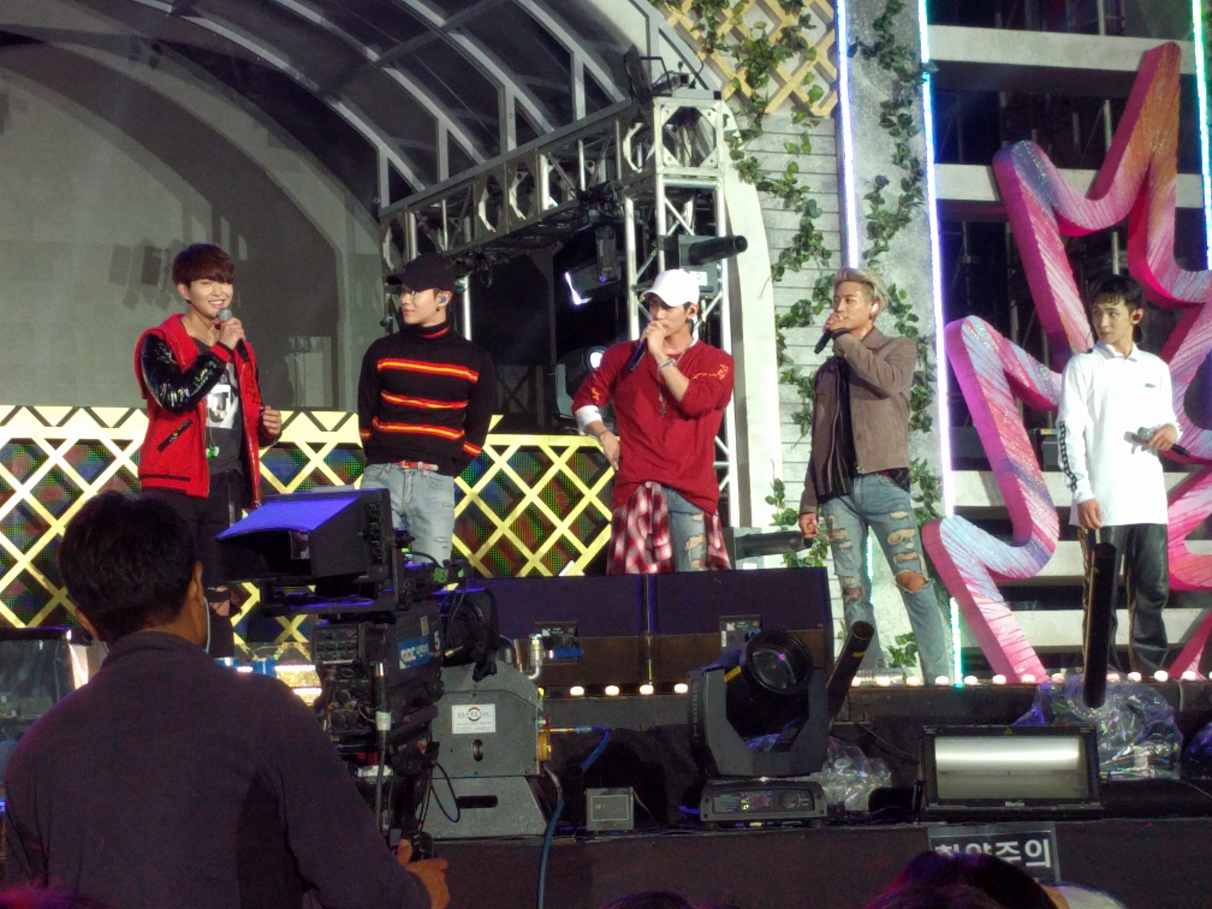 2016년 10월 1일 스펙트럼 댄스 뮤직 페스티벌에서 공연하는 샤이니.